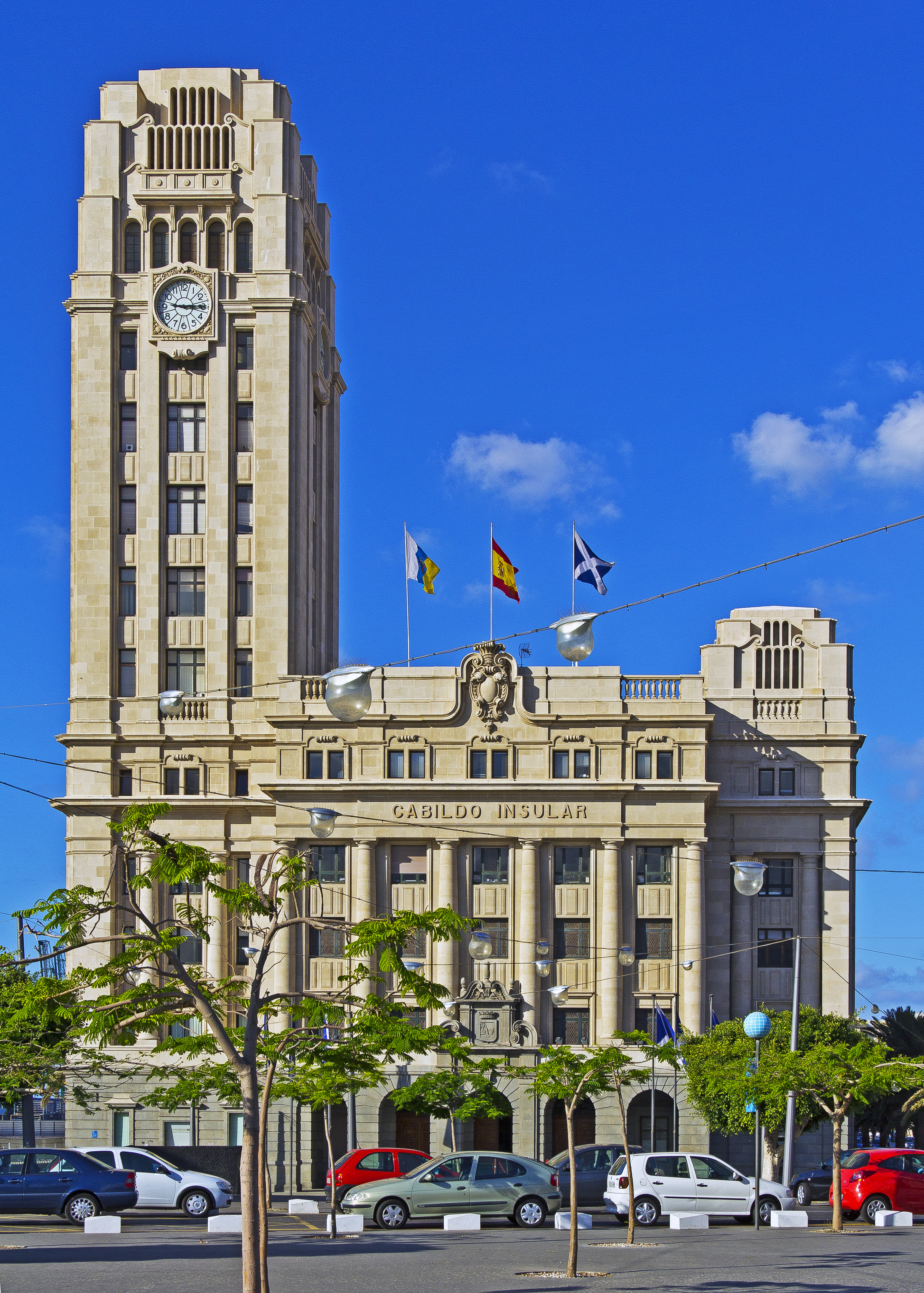 Das Gebäude des Cabildo Insular de Tenerife wurde im Jahr 1934 von dem Architekten José Enrique Marrero Regalado geplant aber erst im Jahr 1940 fertiggestellt. Das Gebäude das die Regierung / Verwaltung der Insel Teneriffa beherbergt ist ein Gestaltungsmerkmal der Plaza de España in Santa Cruz de Tenerife (Spanien).